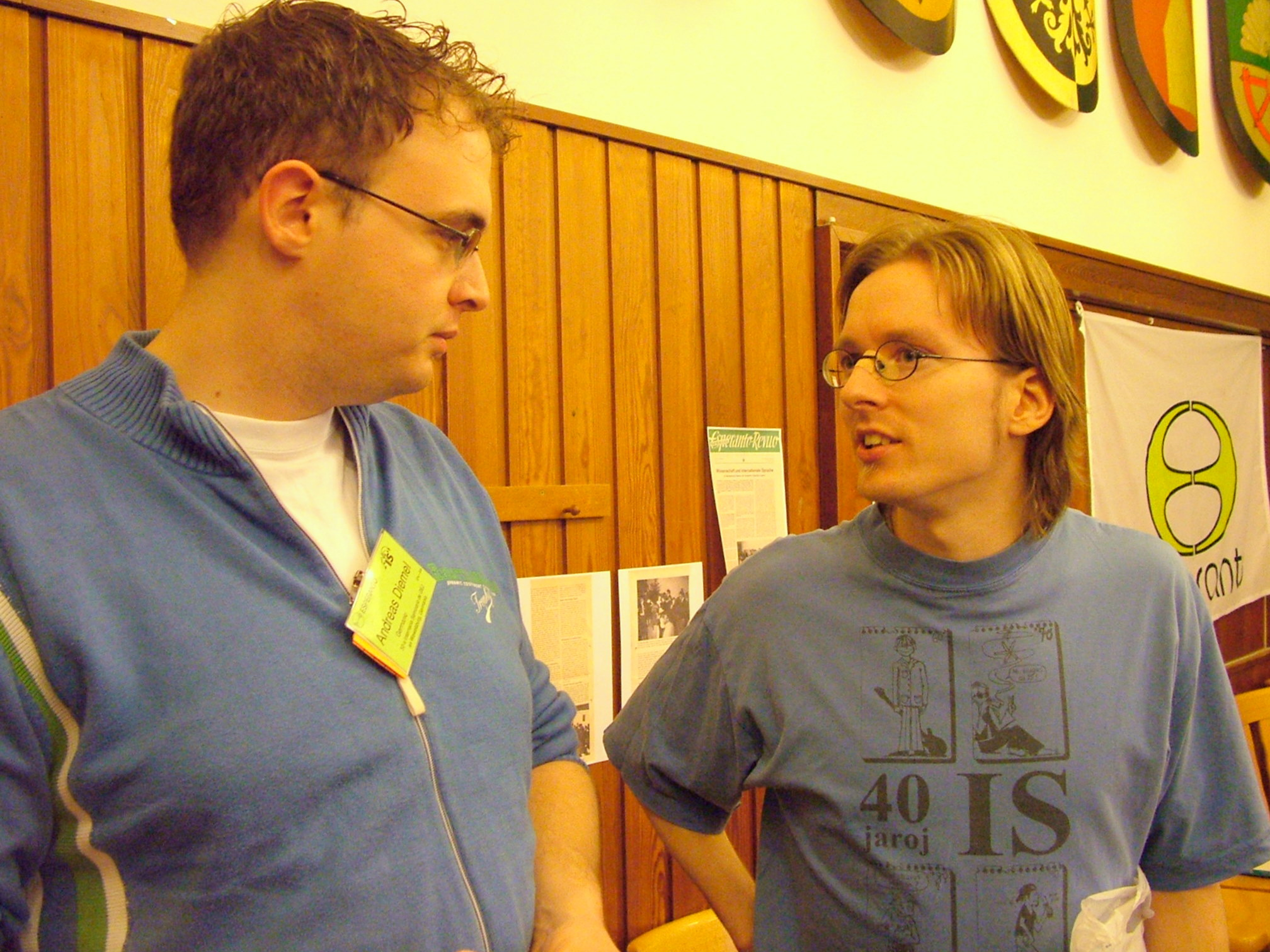 Andreas Diemel, prezidanto de GEJ, kaj Gunnar R. Fischer, prezidinto, dum jubilea arangxo (50a fojigxo), IS Wewelsburg